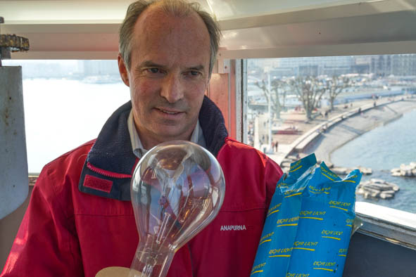 Dans la lanterne le gardien avec en second plan la jetée et les Bains des Pâquis (Genève)